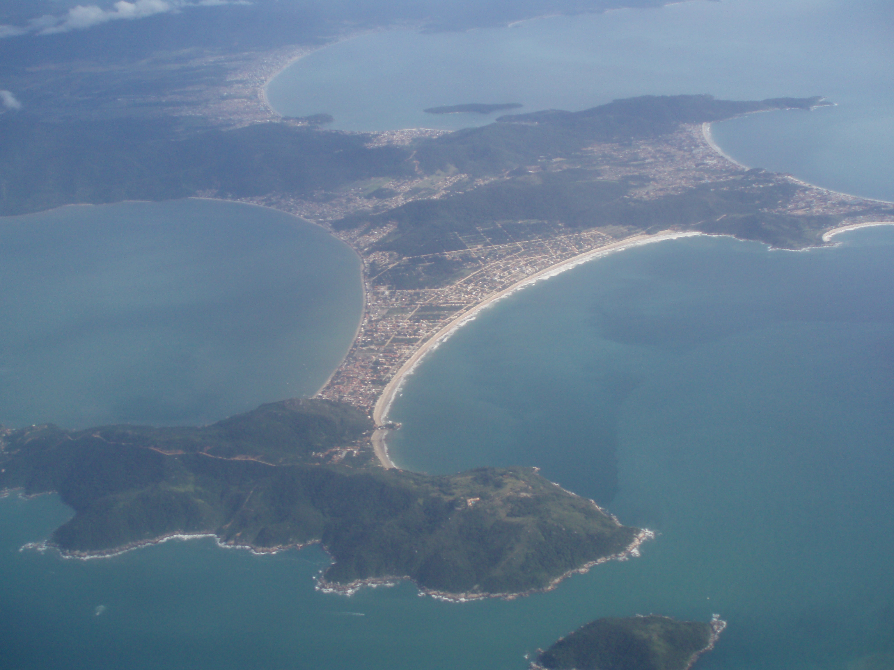 Vue d'avion de la municipalité de Bombinhas, Santa Catarina, Brésil